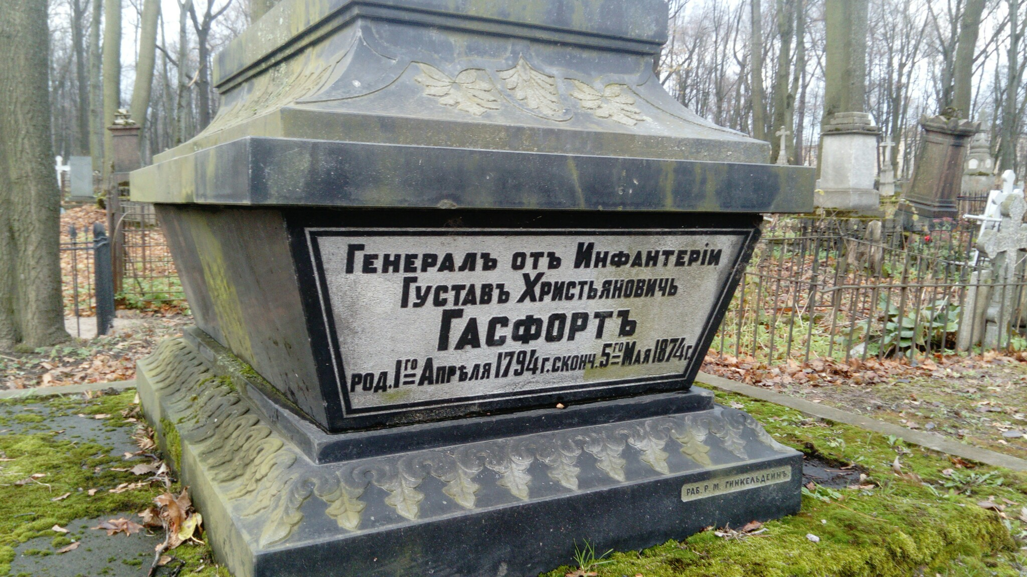 Захоронение генерала Гасфорта